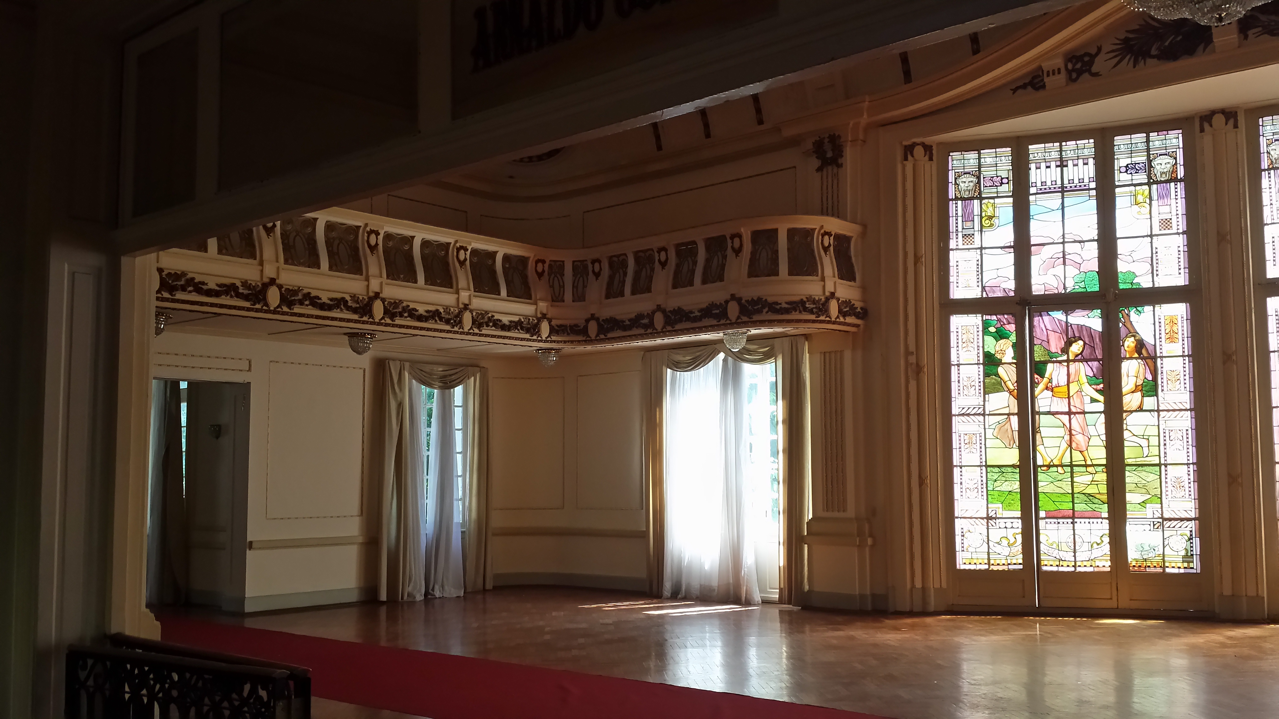 Salão Nobre do Fluminense Football Club.